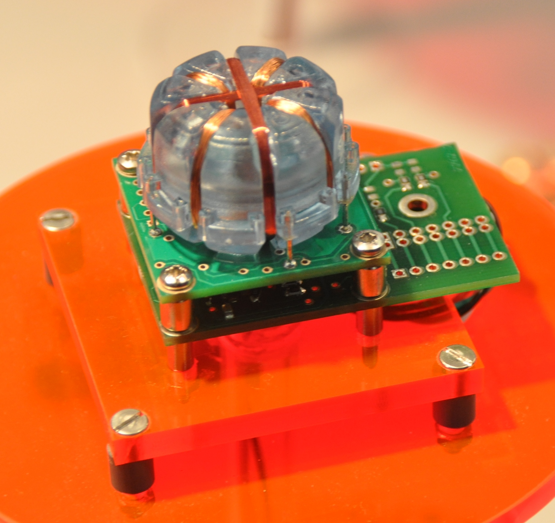 Scheepsmaterialen op de METS 2011 in de RAI te Amsterdam